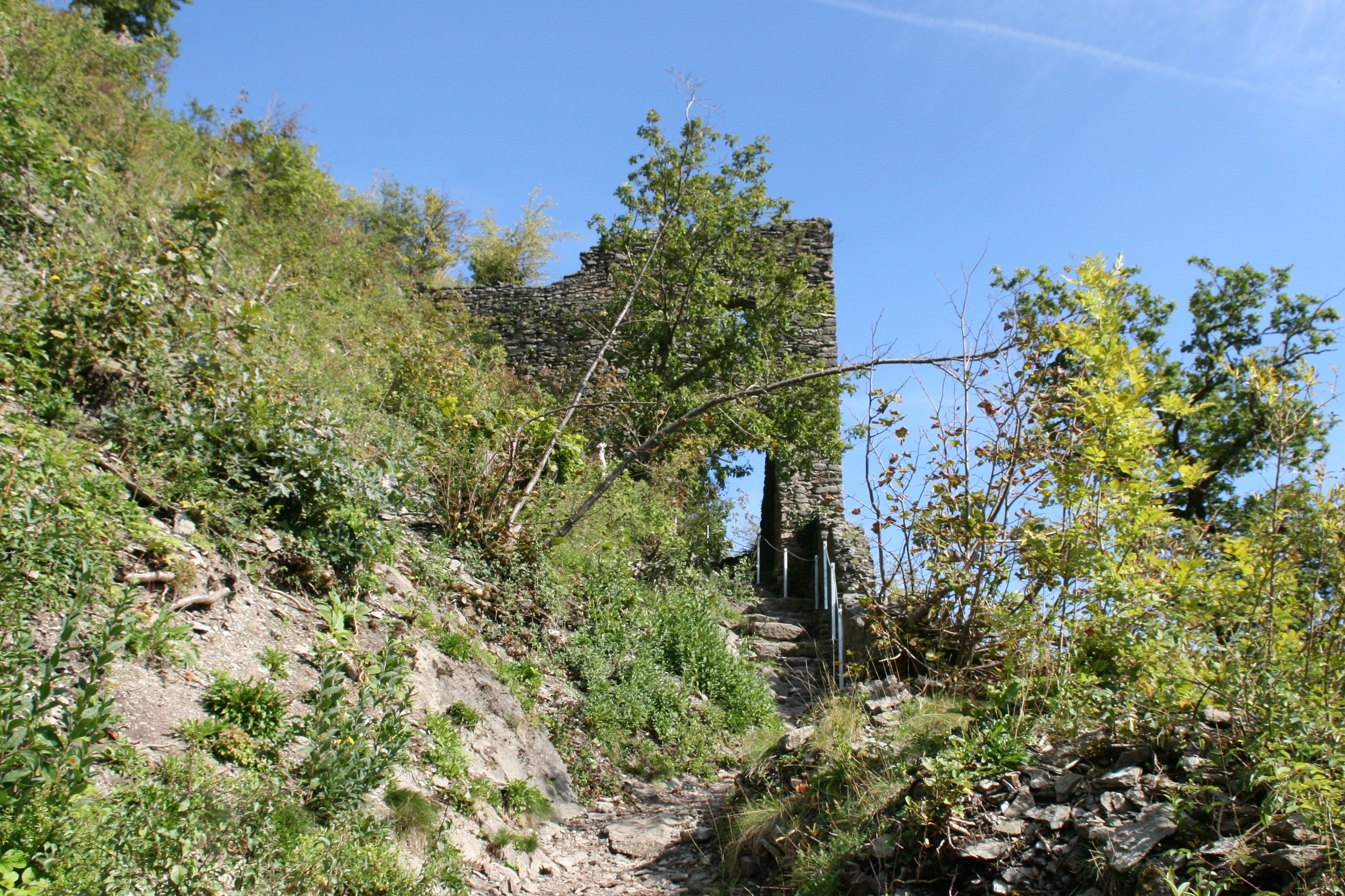 Burg Hohenkrähen auf dem Hohenkrähen in Hilzingen